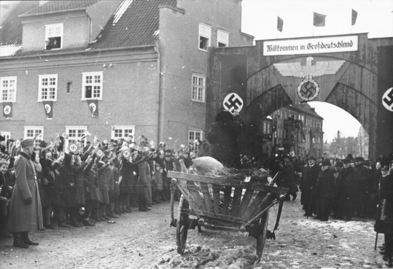 Ostpreußen, Ankunft von Umsiedlern aus Litauen Heimkehr der Volksdeutschen aus Litauen ins Reich. An der Grenzübergangsstelle bei Eydtkau in Ostpreussen trafen die ersten Trecks der Volksdeutschen aus Litauen ein, die nunmehr ebenfalls ins Reich heimgeholt worden sind. UBz: die Wagen des ersten Trecks bei der Einfahrt in Eydtkau. Die Bevölkerung hatte zu ihrem Empfang ein mit Fahnen geschmücktes Tor errichtet und begrüsste die Volksdeutschen mit herzlicher Freude. 28.2.1941